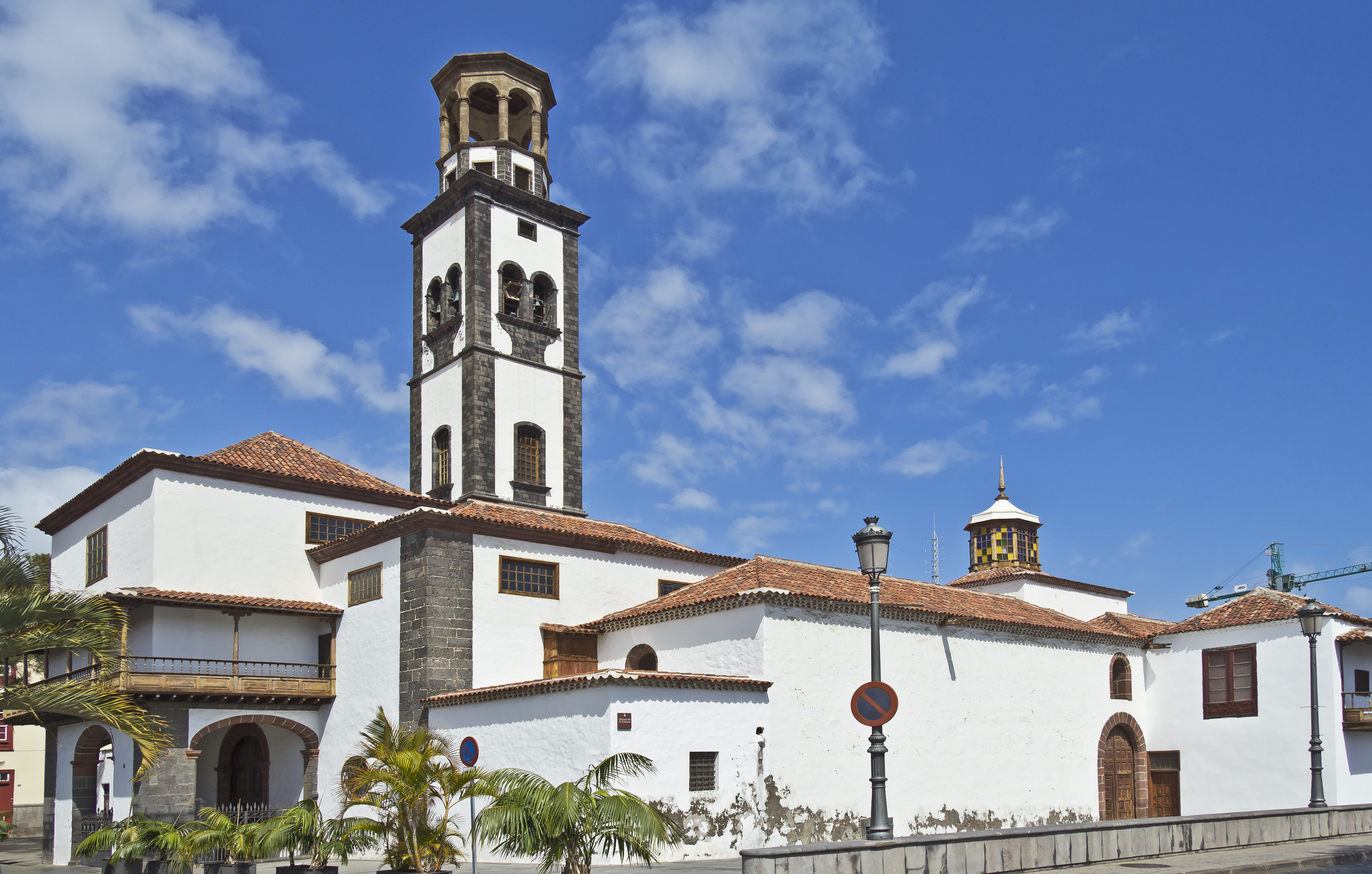 Südseite der Kirche Nuestra Señora de la Concepción in Santa Cruz de Tenerife.